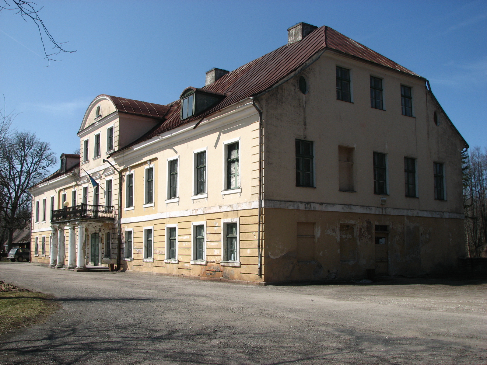 Vatla mõis Hanila vallas